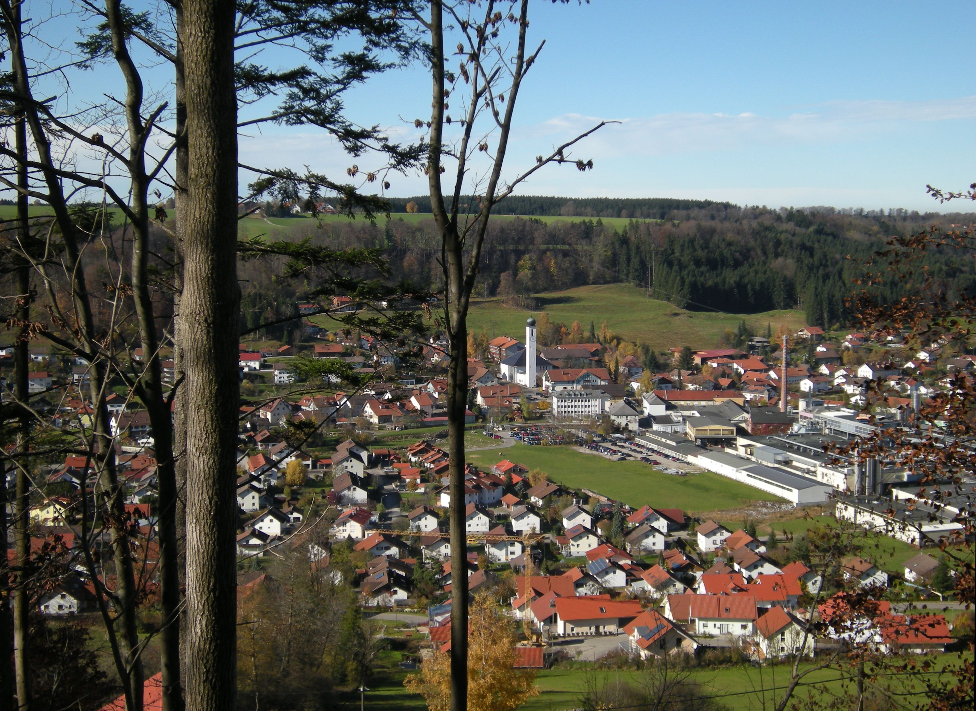 Ronsberg - Günztal mit Ort